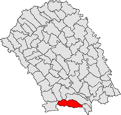 Categorie:Hărţi ale judeţului Botoşani